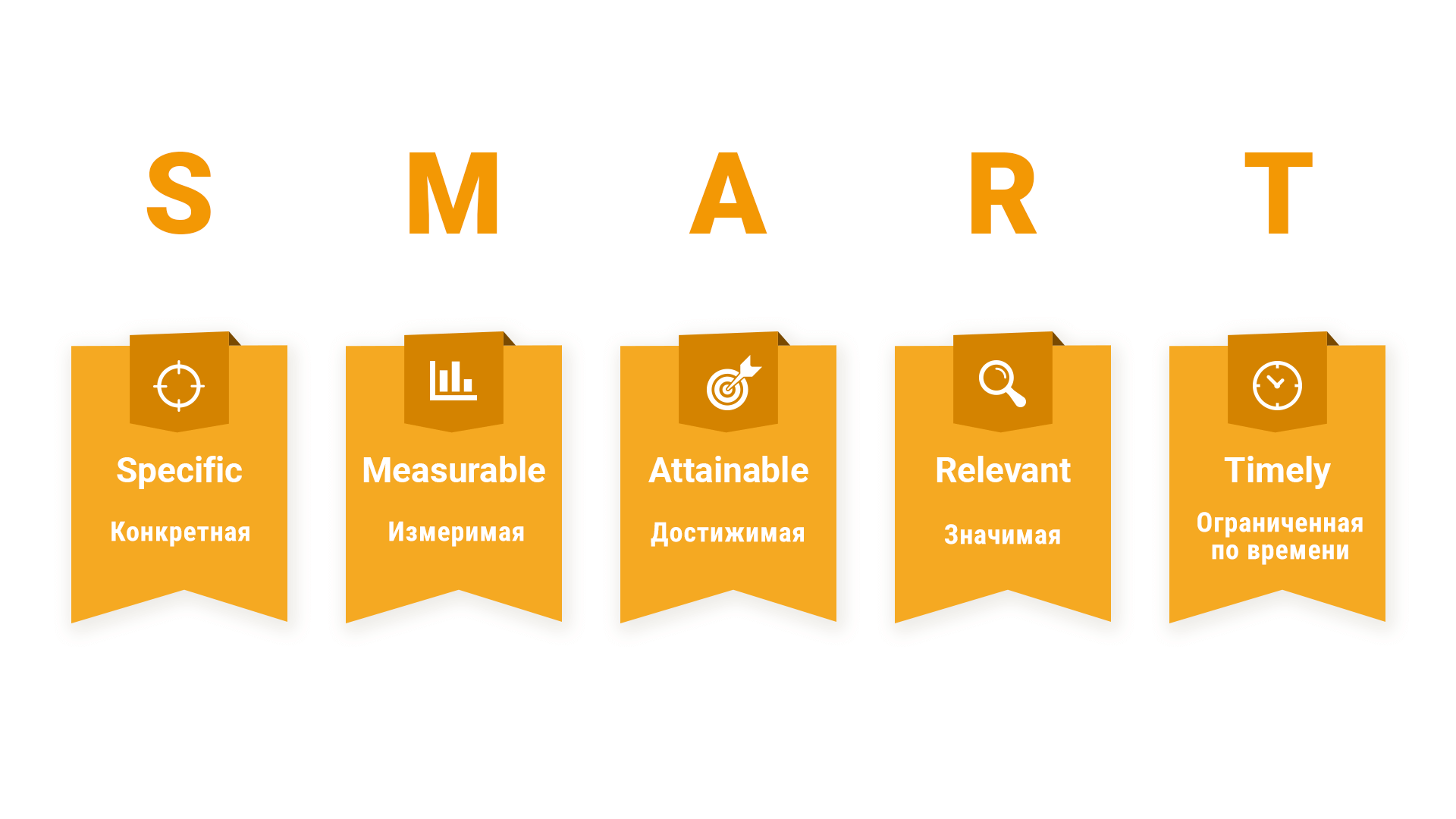 Эта картинка нужна для заполнения страницы на медиавики